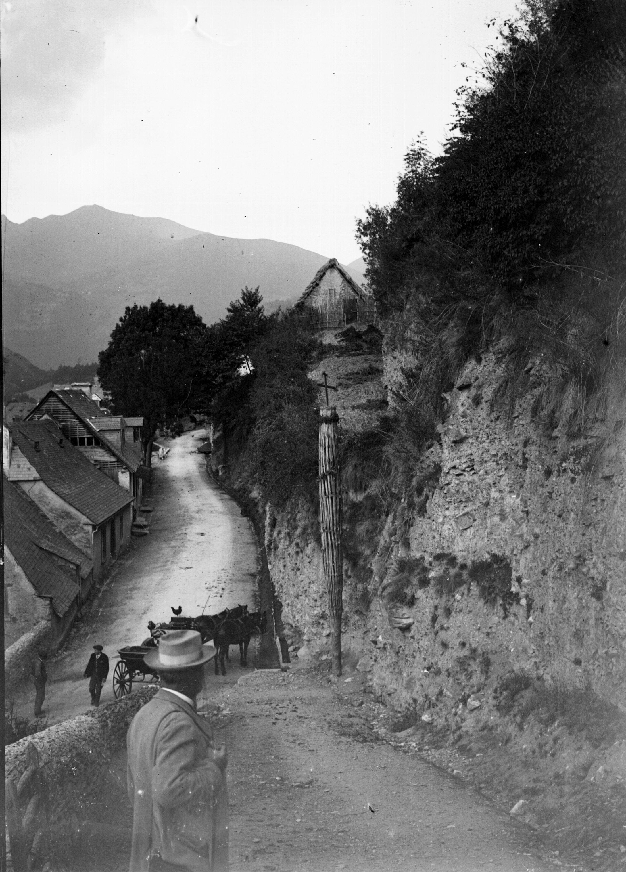 "Brandon", arbre préparé pour le feu de la Saint-Jean à Saint-Aventin près de Luchon (Haute-Garonne, France). Photographie d'Eugène Trutat. Fonds Trutat - Photographie ancienne Lieu de création : Saint-Aventin (Haute-Garonne) Observations : Notes manuscrites Trutat illisibles. Mot(s)-clé(s) : -- Vallée -- Route -- Village -- Maison -- Chemin -- Homme -- Costume masculin -- Voiture à attelage -- Cheval -- Arbre -- Végétation -- Fête de la Saint-Jean [?] -- Saint-Aventin (Haute-Garonne) -- Bagnères-de-Luchon (Haute-Garonne ; canton) -- Larboust, Vallée du (France) -- Pyrénées (France) -- 19e siècle, 4e quart